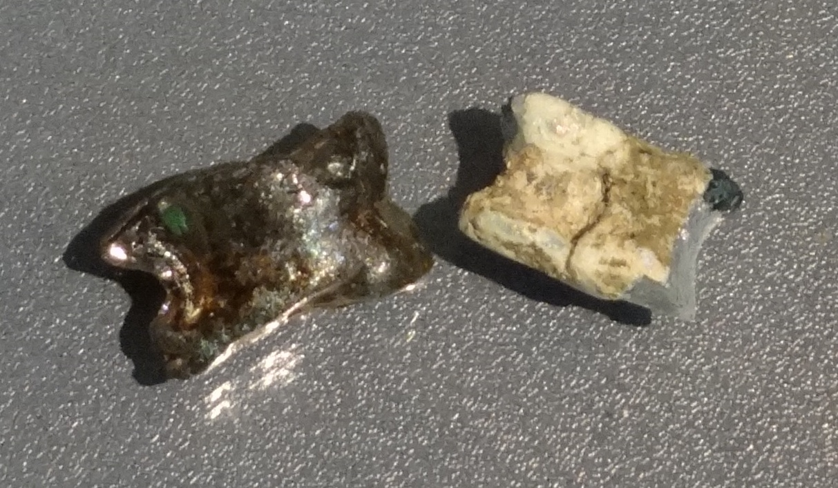 כלי משחק בצורת אסטרגל מזכוכית שנמצאו במרשה המעידים על חשיבות צורה זאת בתרבויות בעת עתיקה מאות 3-2 לפני הספירה התקופה ההלניסטית